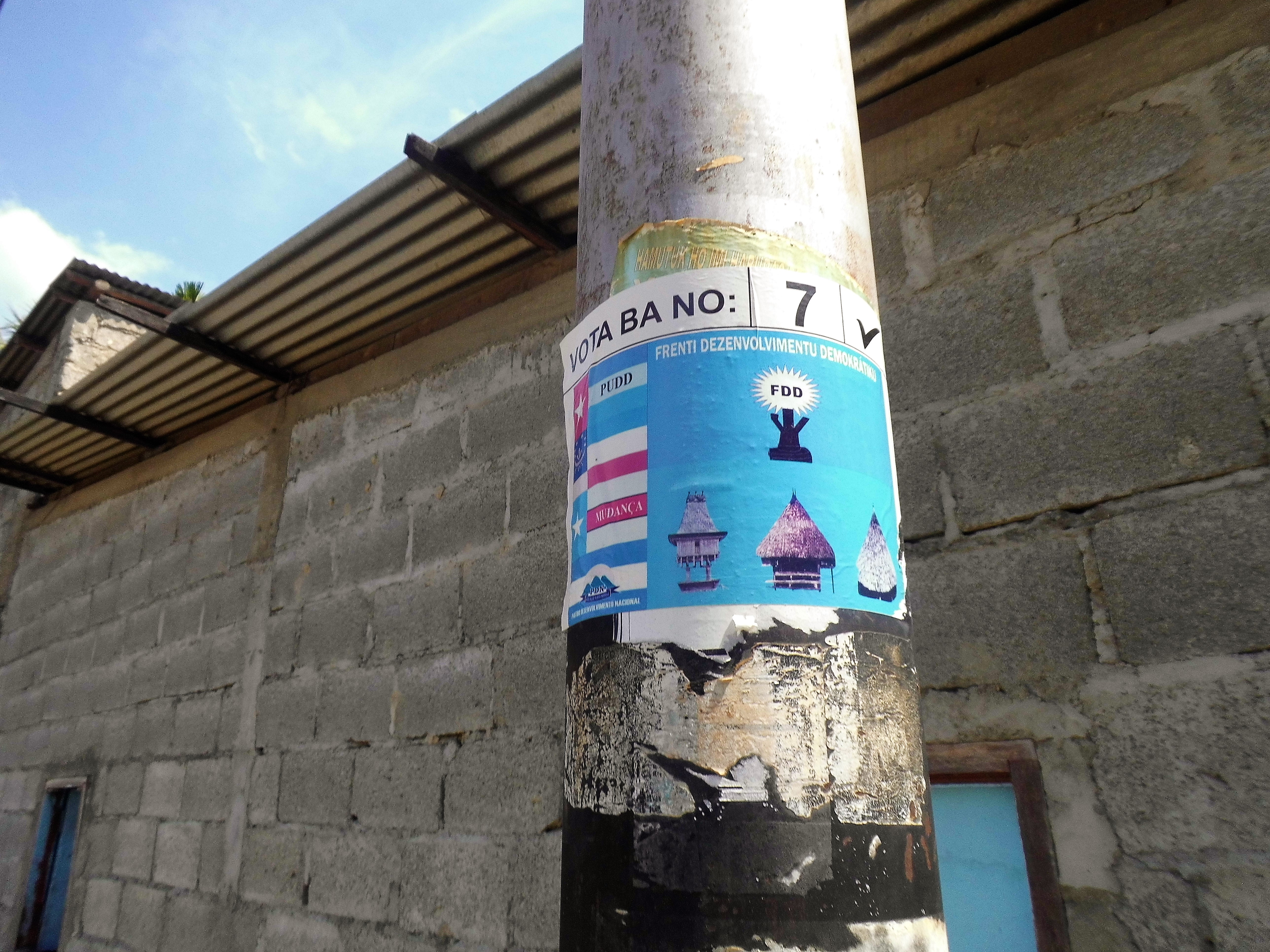 Wahlplakat der FDD 2018